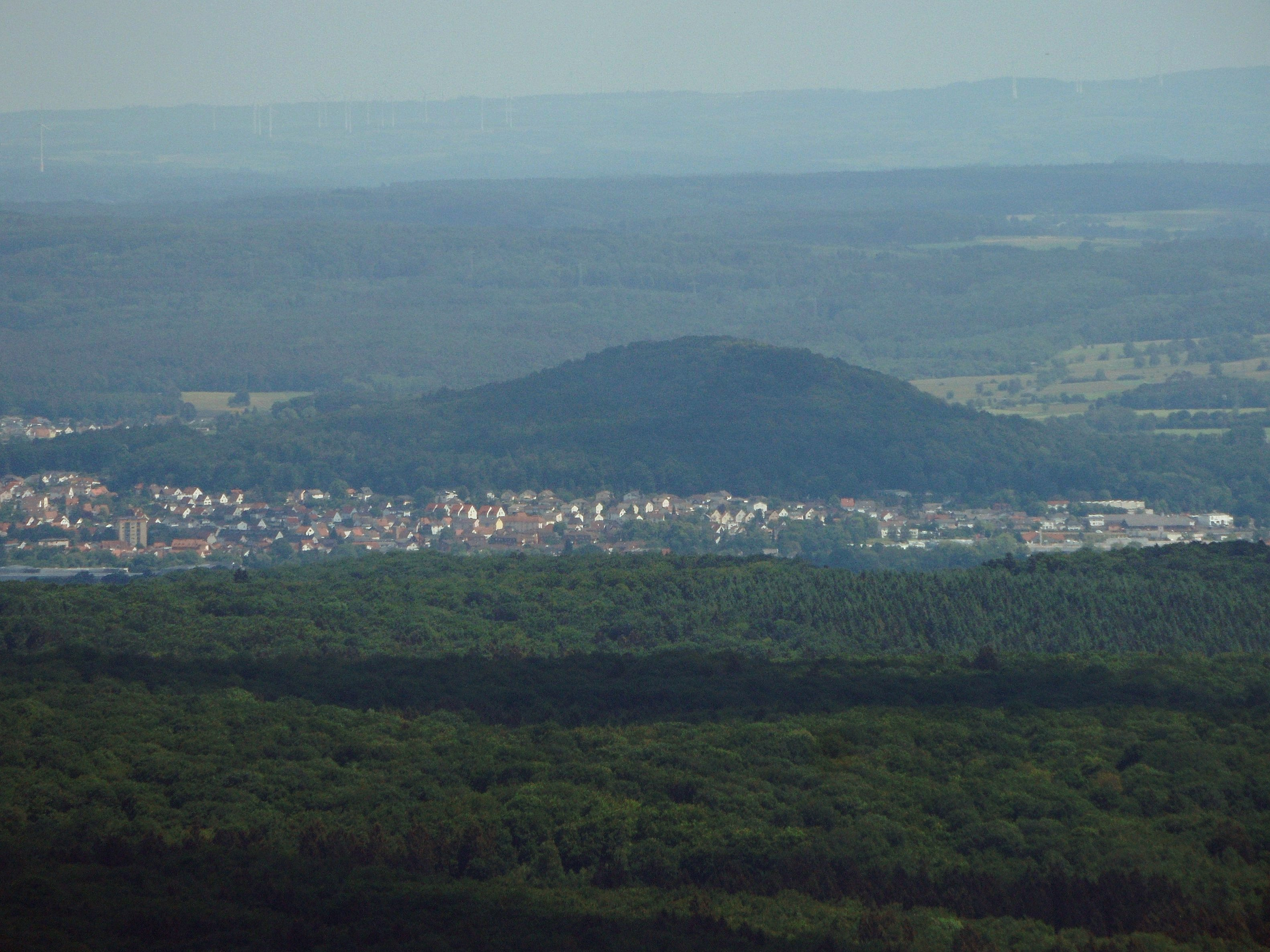 Lollar im Lahntal mit Lollarer Kopf (Westansicht) vom Dünsbergturm aus ca. 15 km Entfernung, im Vordergrund der Krofdorfer Forst; Mai 2018.